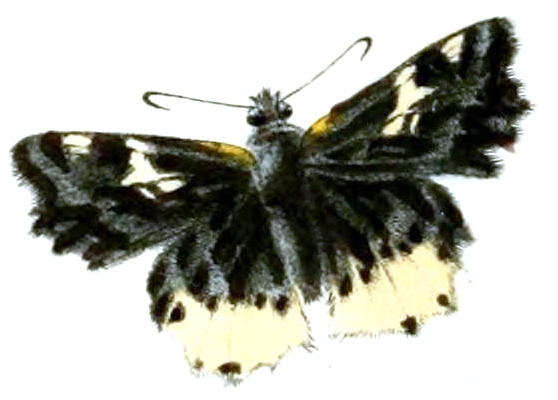 Darpa hanria = Darpa hanria Moore, [1866]